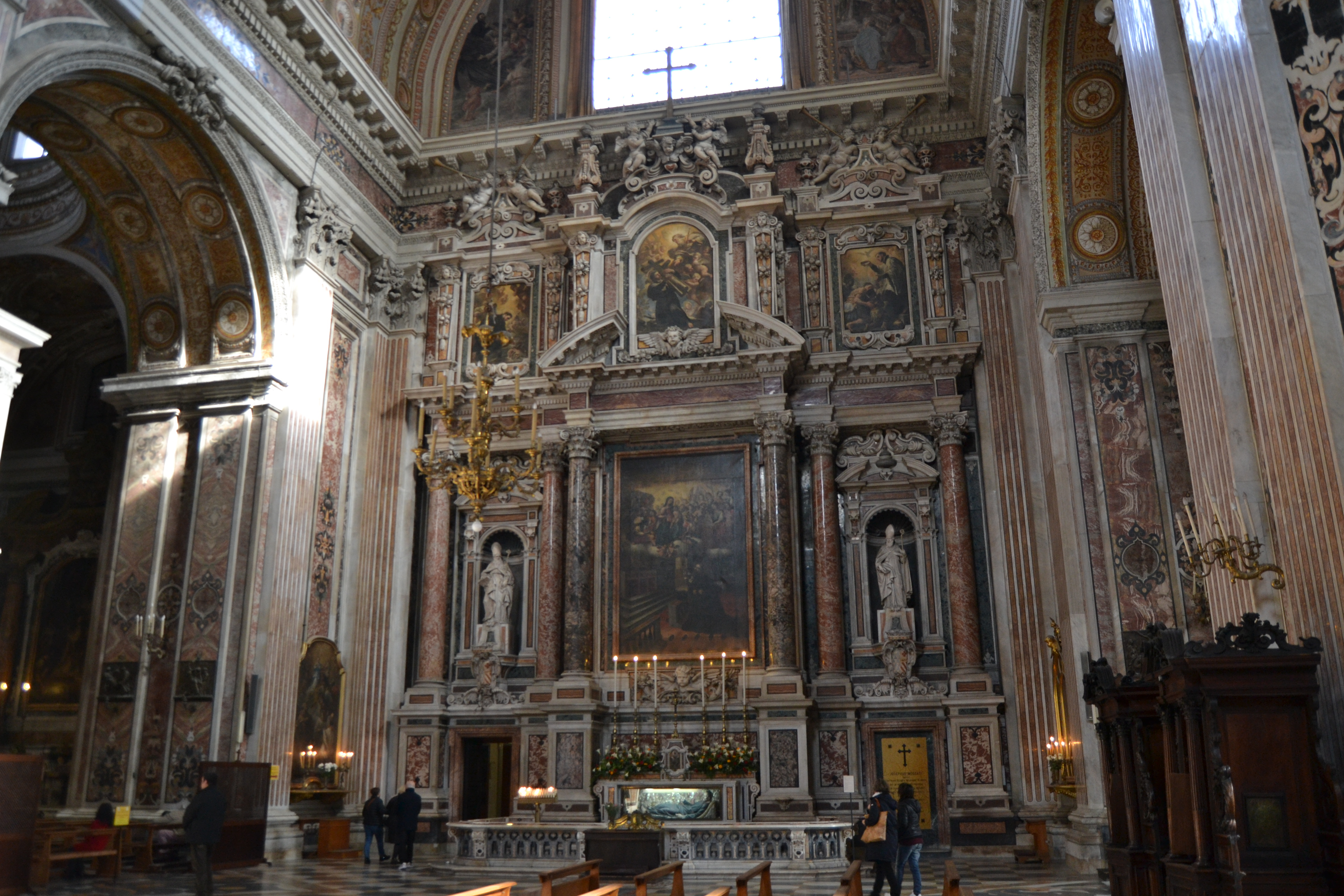 Cappellone di San Francesco Saverio - Transetto destro della Chiesa del Gesù Nuovo di Napoli